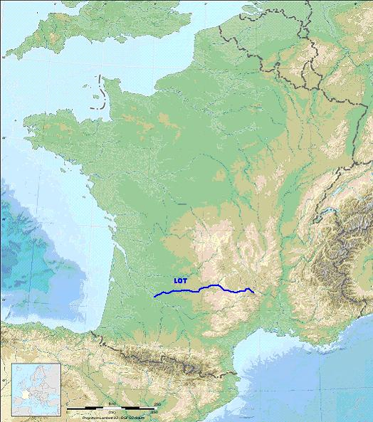 parcours simplifié du Lot